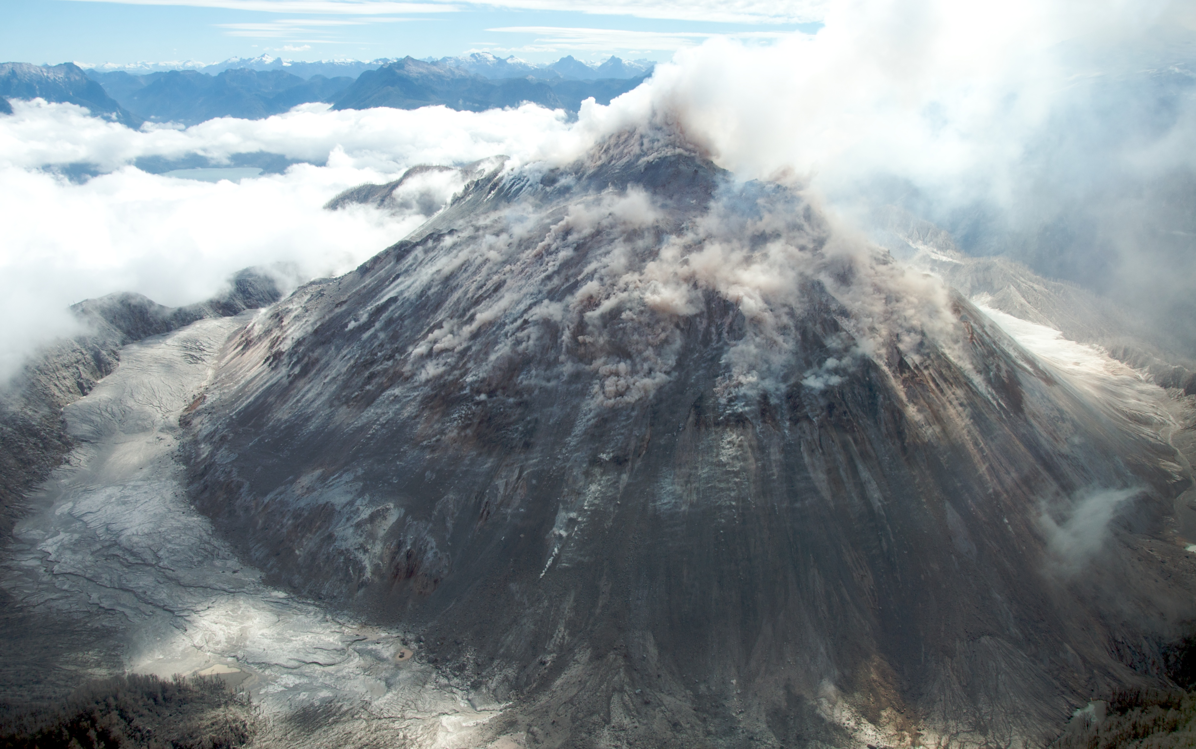 Vista aerea del Volcán Chaitén.